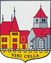 Blason Vincelles Jura France